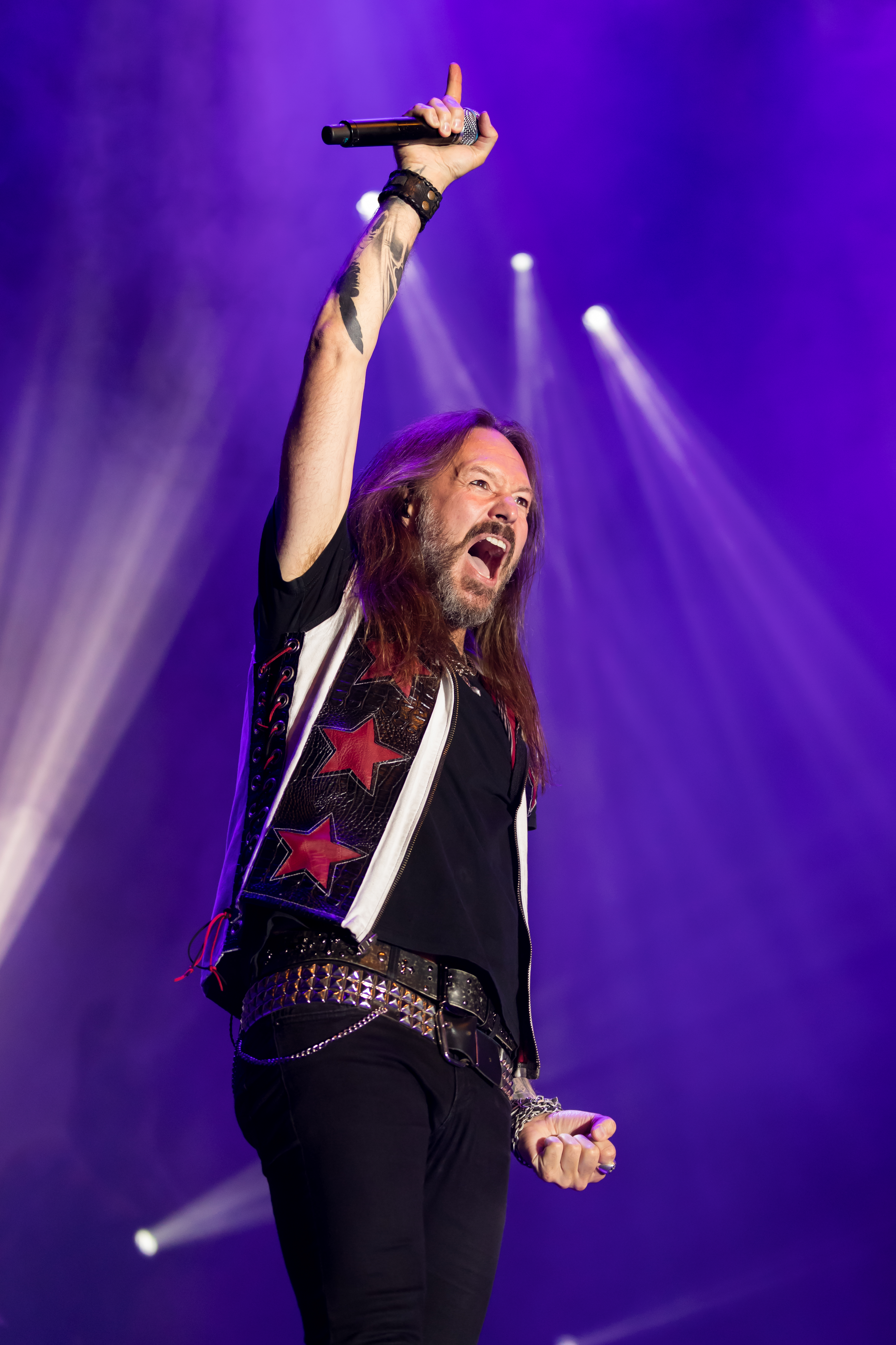 Hammerfall during Zeltfestival Rhein-Neckar at Maimarkt, Mannheim, Baden-Württemberg, Germany on 2017-06-24, Photo: Sven Mandel